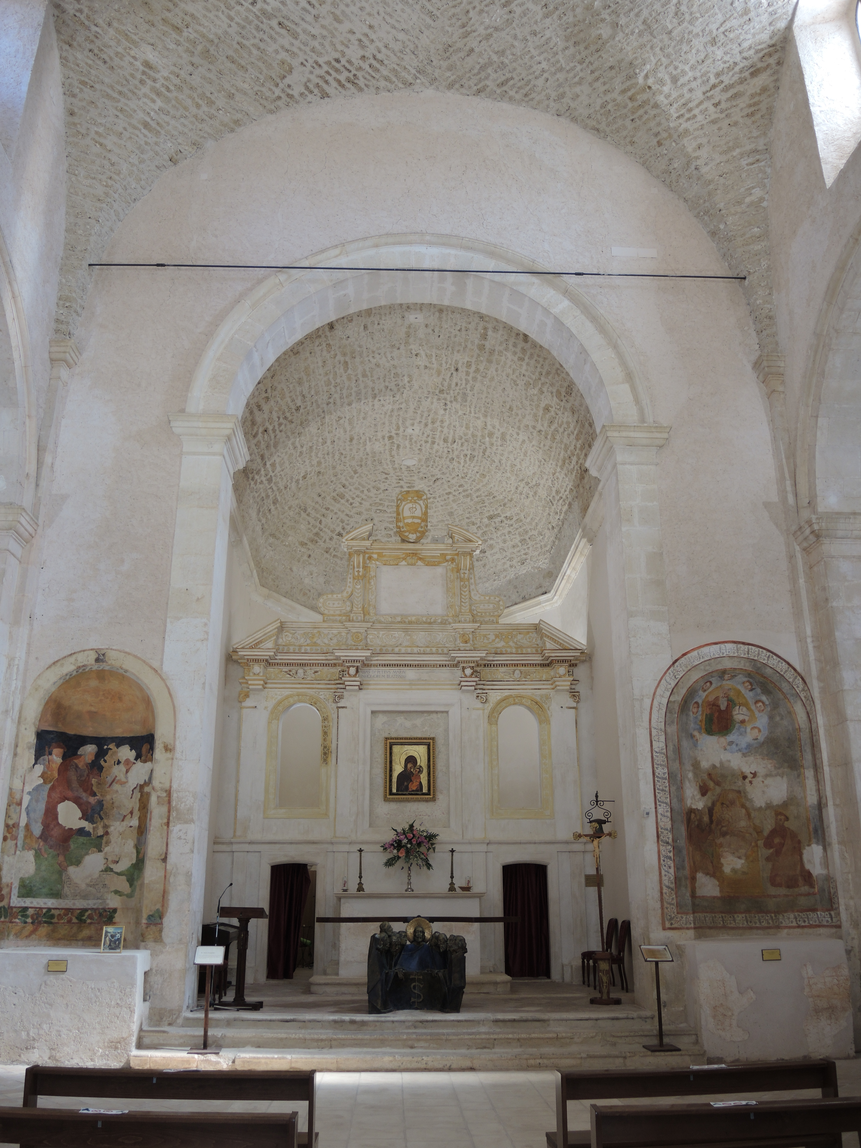 Caporciano - Chiesa di Santa Maria dei Cintorelli